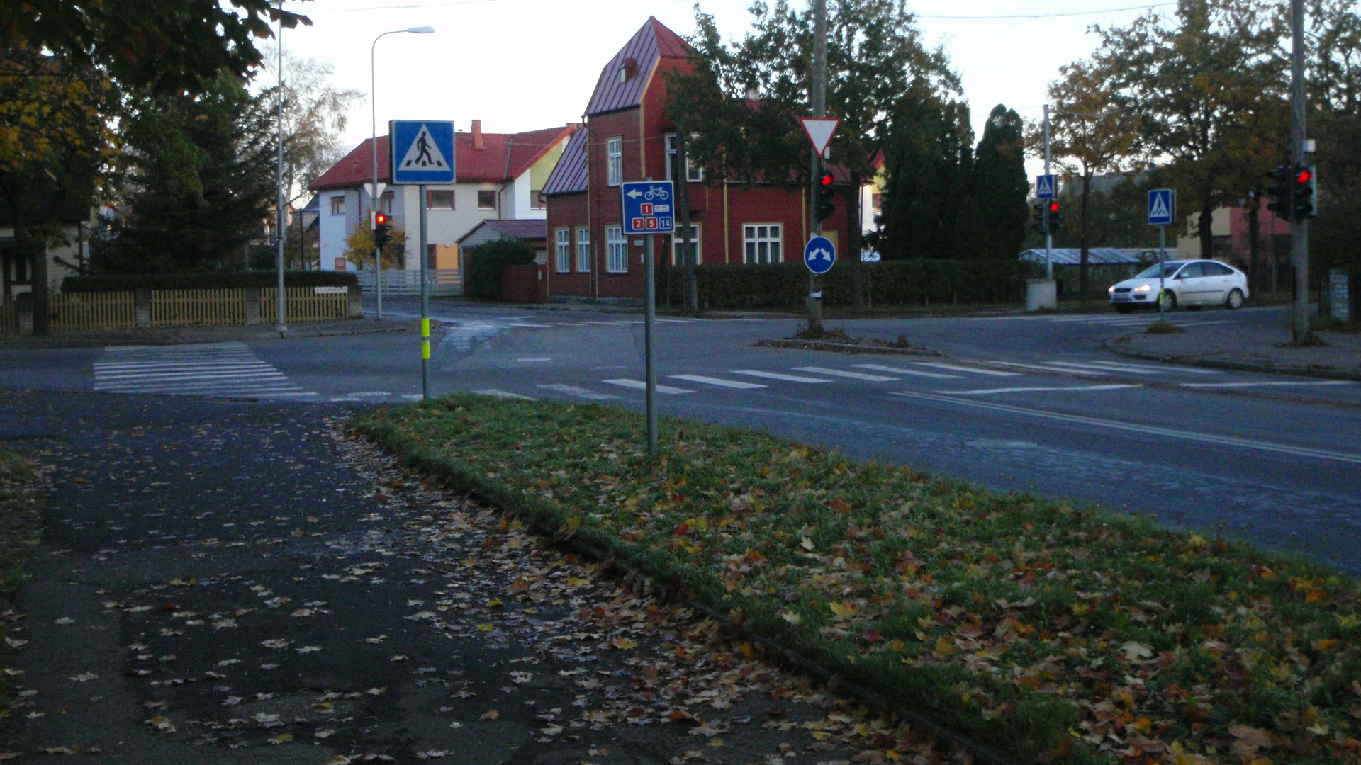 A. H. Tammsaare pst, Mai tn ja Suur-Kuke tn ristmik Pärnus